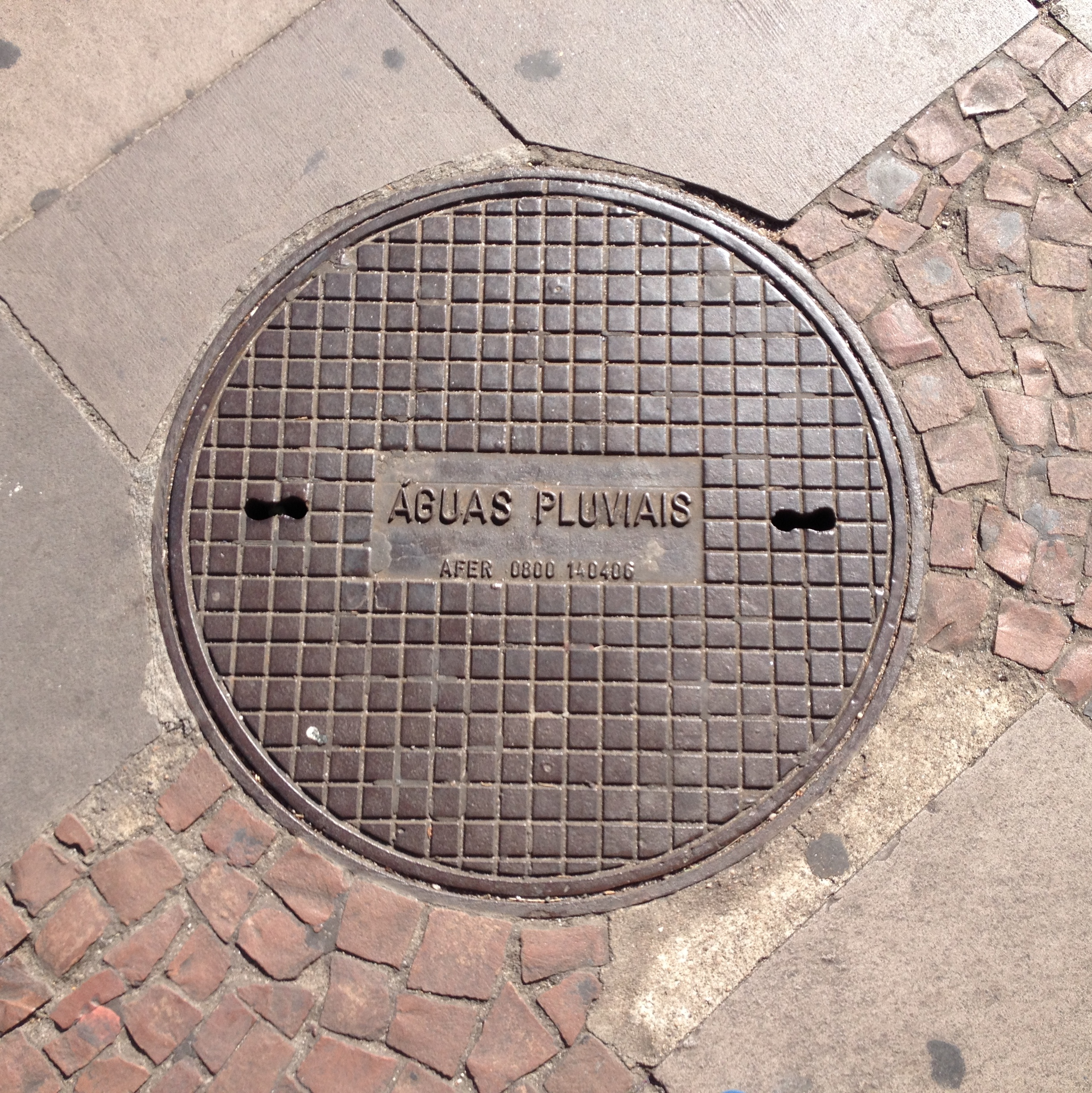 Poço de visita de rede de águas pluviais (chuva). Campinas, SP.